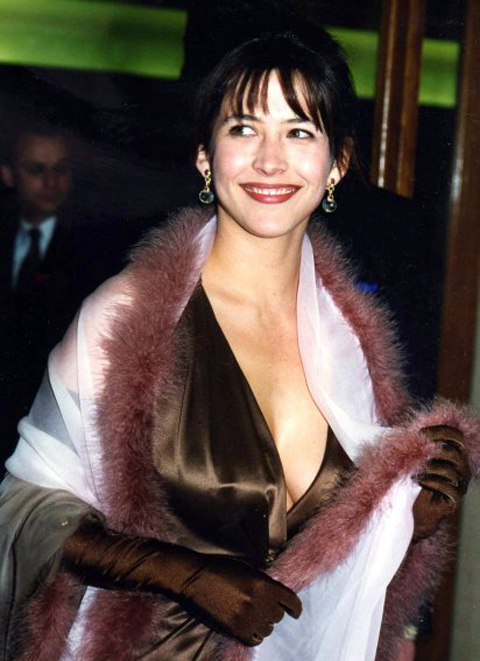 Sophie Marceau à la cérémonie des césars.